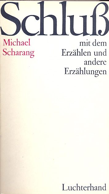 Michael Scharang, Schluß mit dem Erzählen und andere Erzählungen. Neuwied, Berlin: Luchterhand 1970